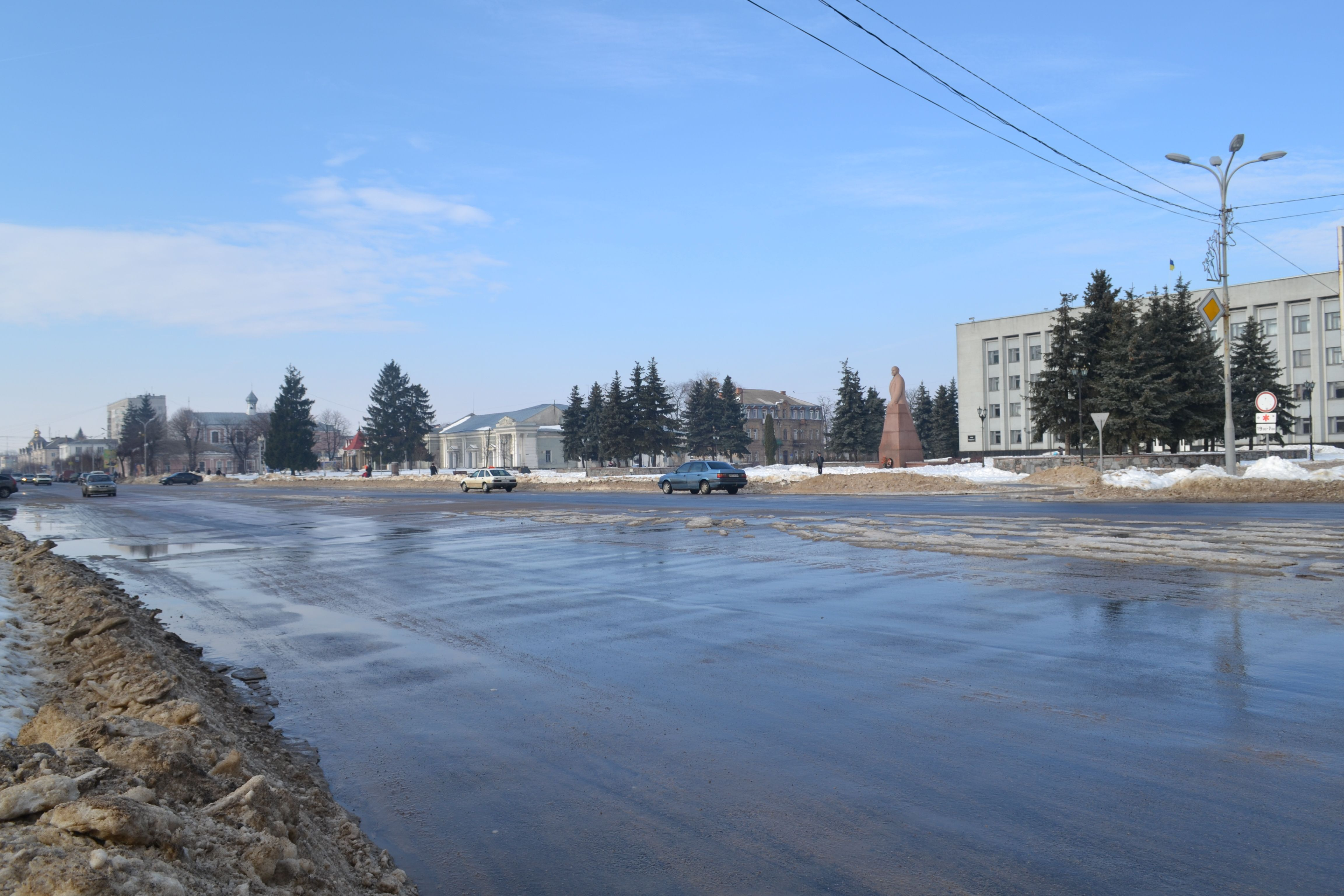 Пам'ятник Леніну В. І., Бердичів, пл. Центральна